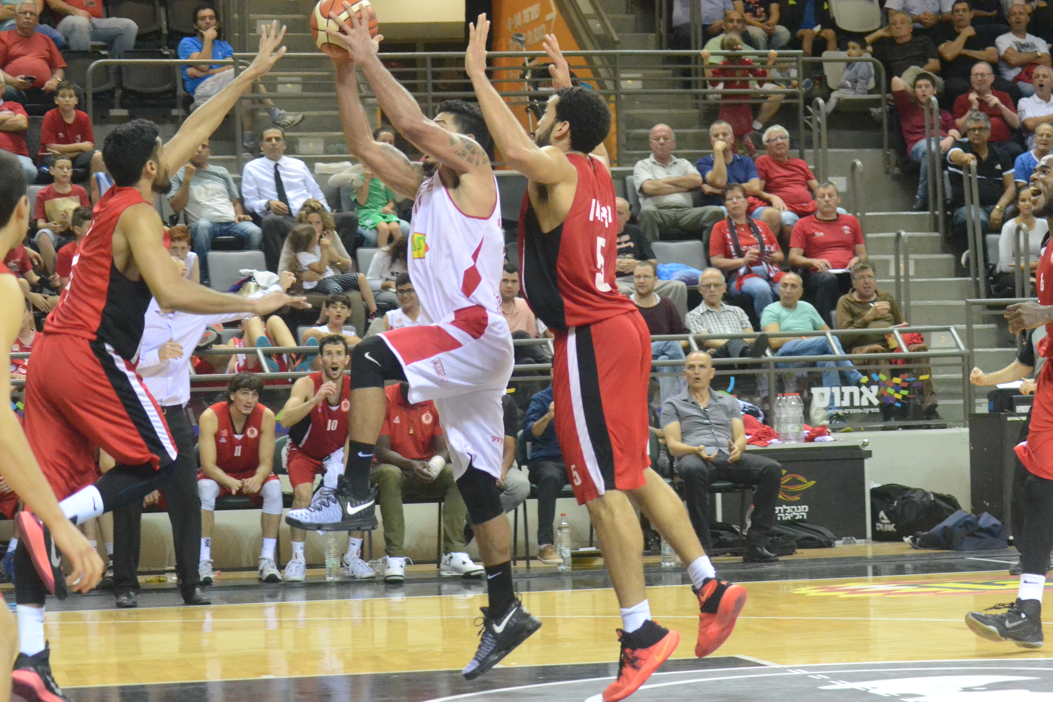 הפועל עפולה (באדום) במסגרת הליגה הלאומית 2016